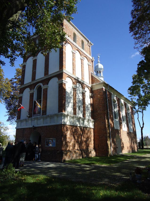 Kościół parafialny p.w. św. Józefa z XVII w. w Siecieniu.